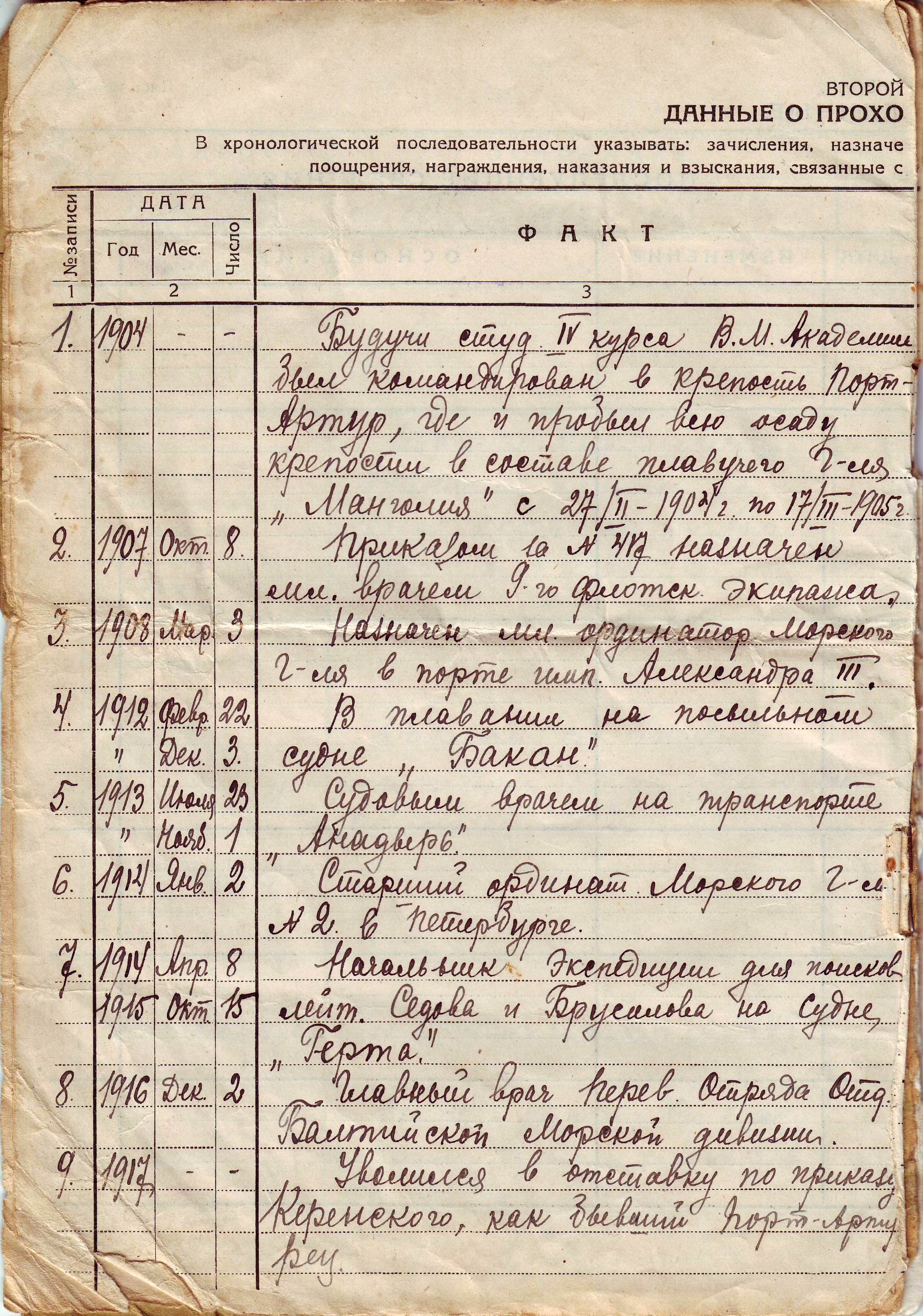 Послужной список